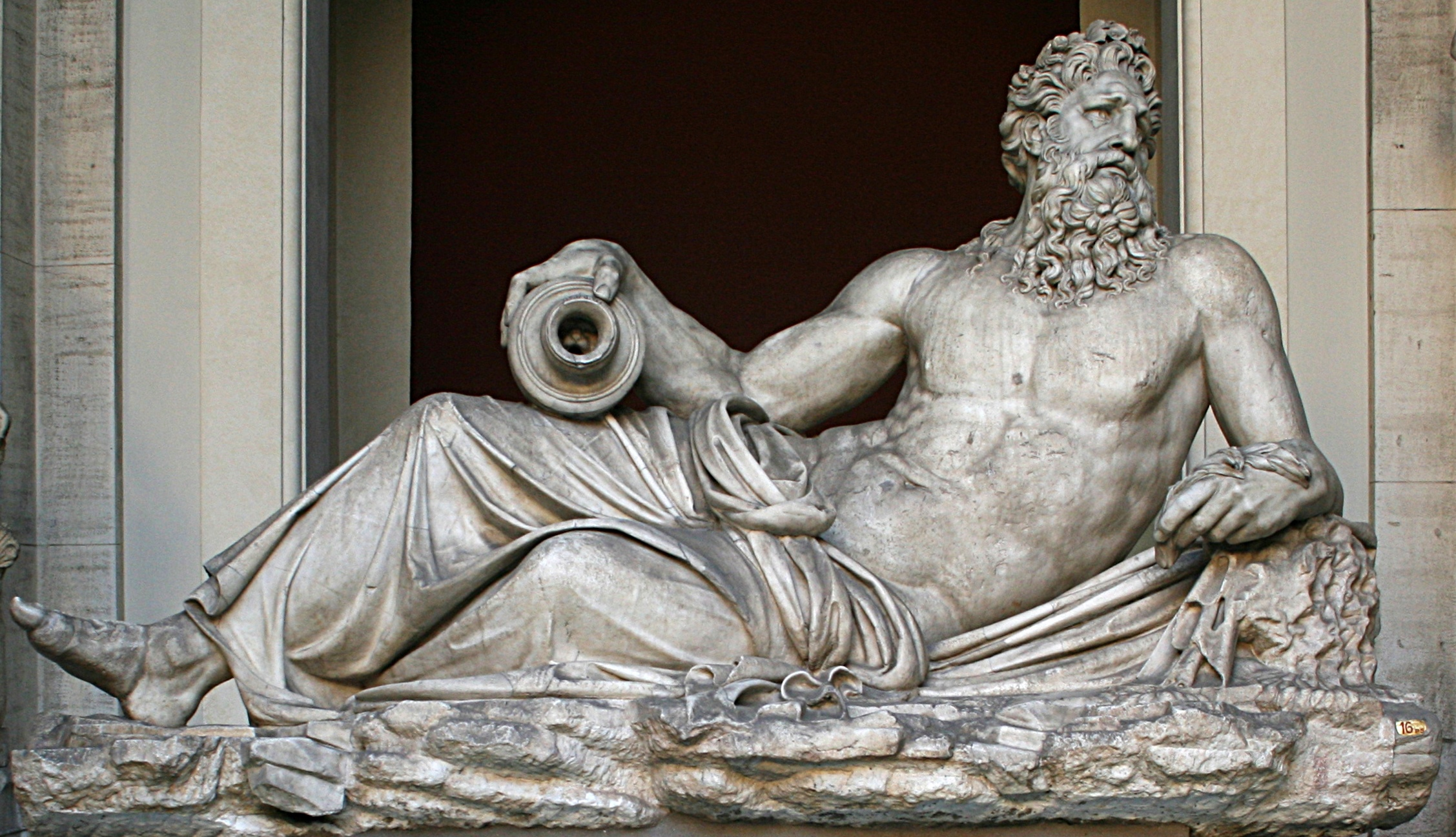 Personificazione del fiume Tigri (databile al 160-170 d.C., quindi alle campagne in Parthia di Lucio Vero) - Musei Vaticani